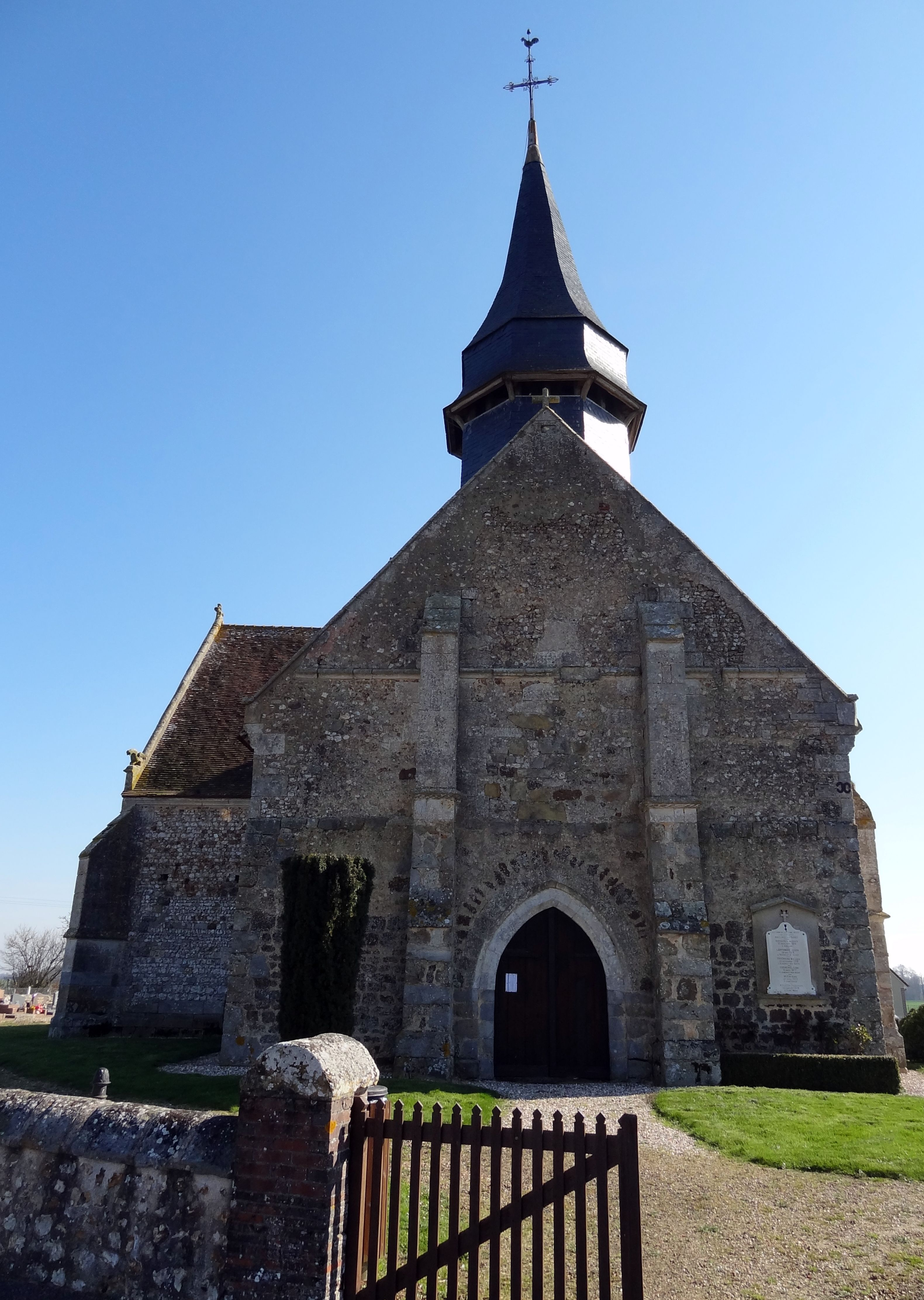 Eglise de Dame-Marie, XIIe siècle.